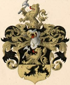 Weymarni suguvõsa aadlivapp